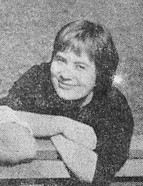 Suomalainen näyttelijä Ritva Valkama (s. 1932) vuonna 1961.